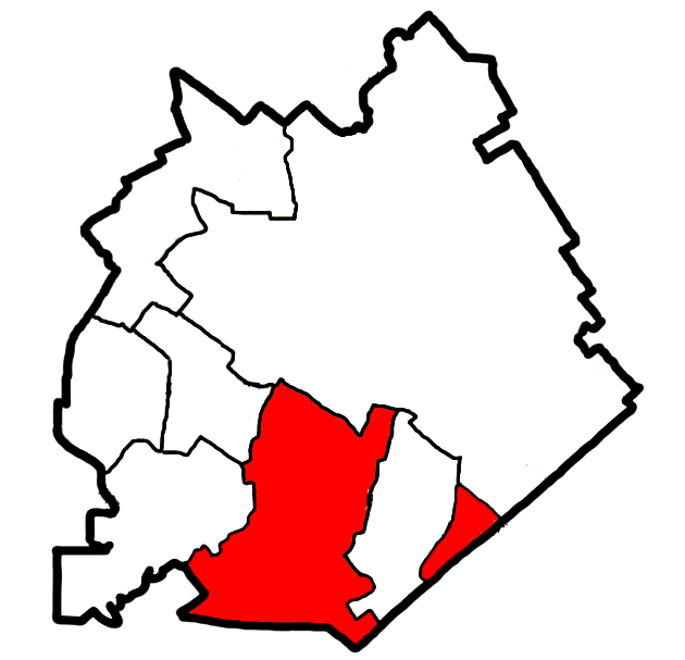 Могилёвская сельская громада